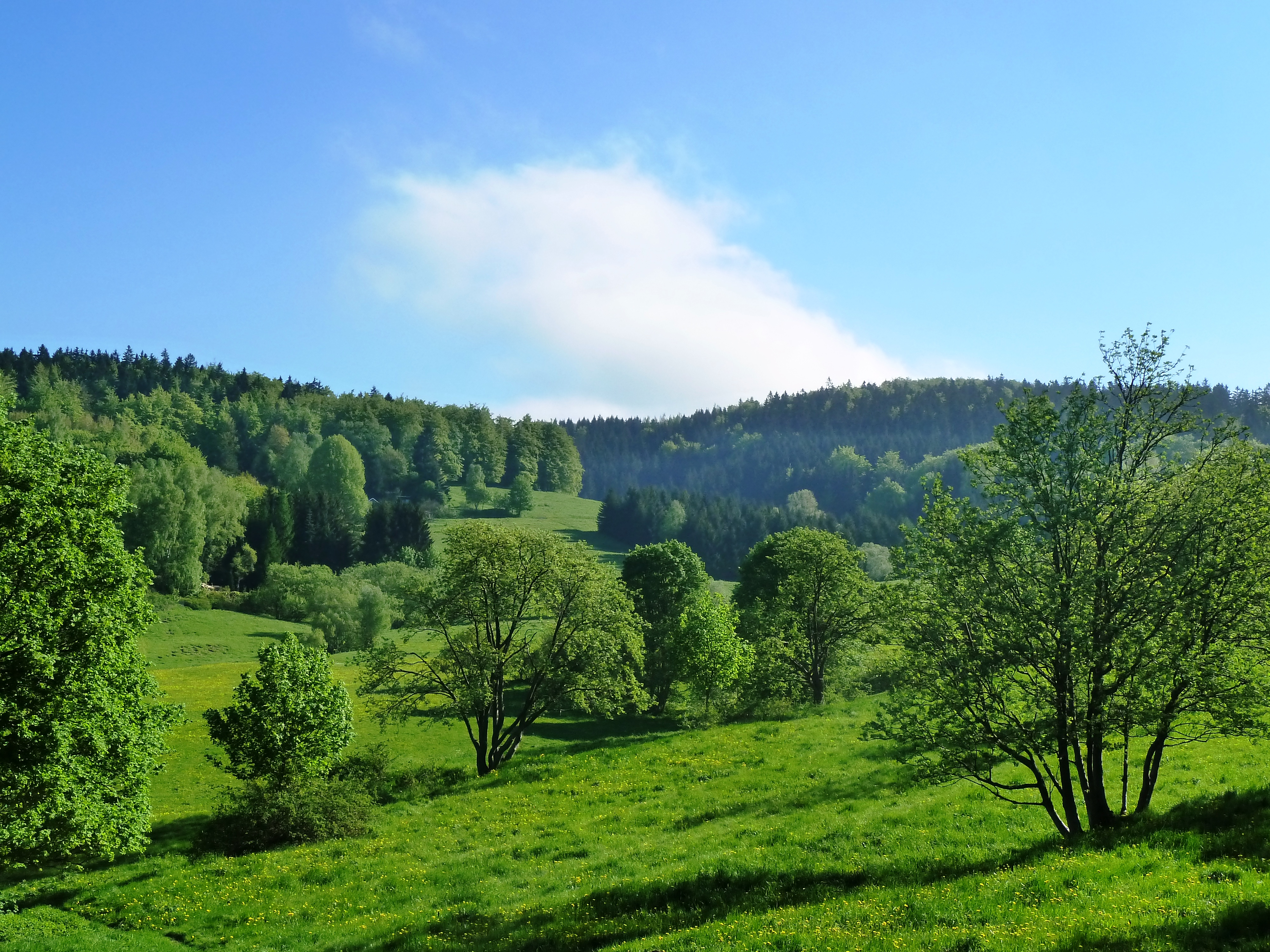 Blick Richtung Ski-und Rodelwiese Stachelsrain